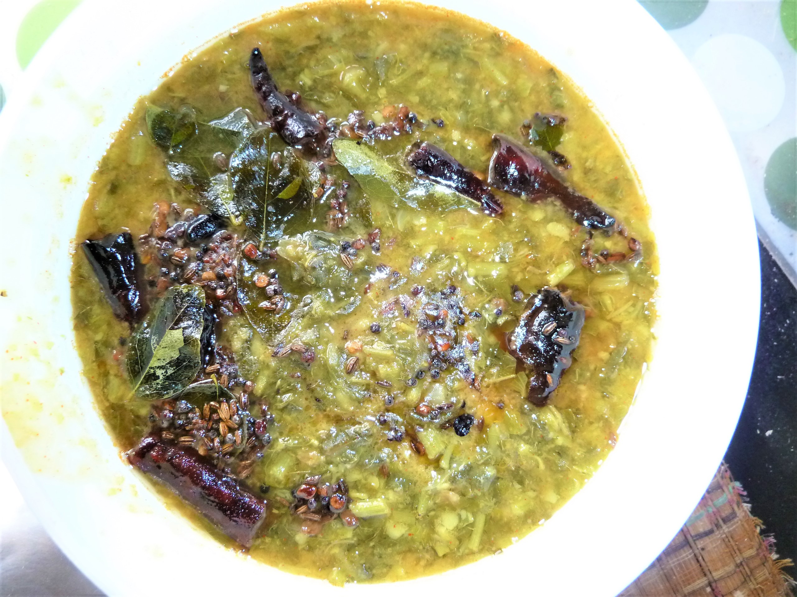 తోటకూర పులుసు